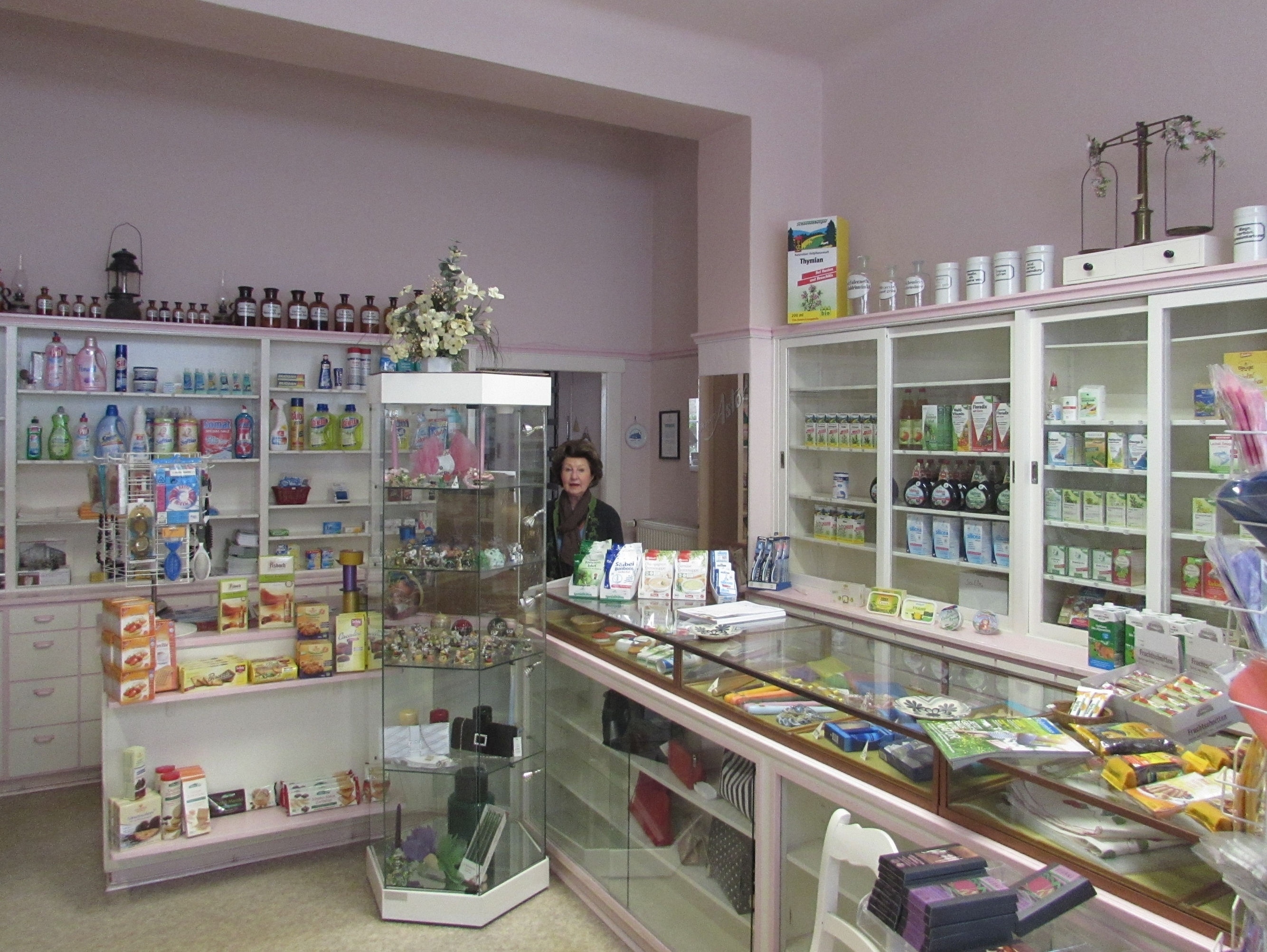 denkmalgeschützte ladeneinrichtung der ehemaligen drogerie im Wohn- und Geschäftshaus Gustav Weylands unter der Adresse Parduin 1 bis 2/Ecke Rathenower Straße 7 in Brandenburg an der Havel